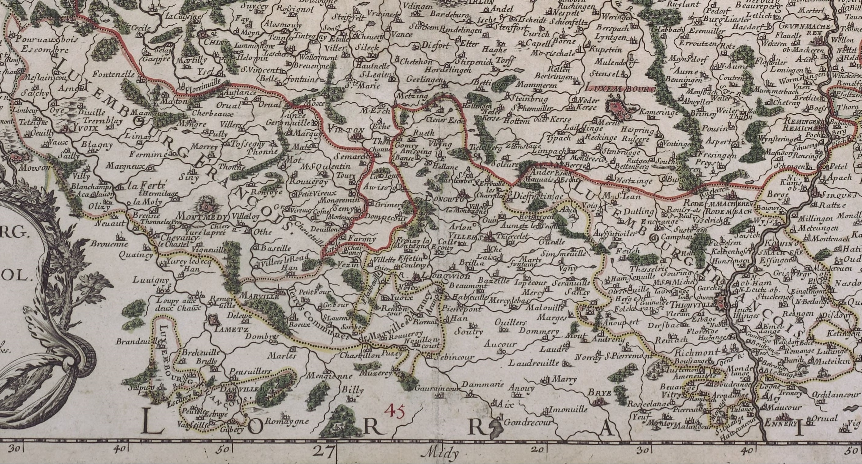 Le duché de Luxembourg divisé en François et Espagnol. Par le Sr. Sanson. Chez H. Iaillot (a Paris).